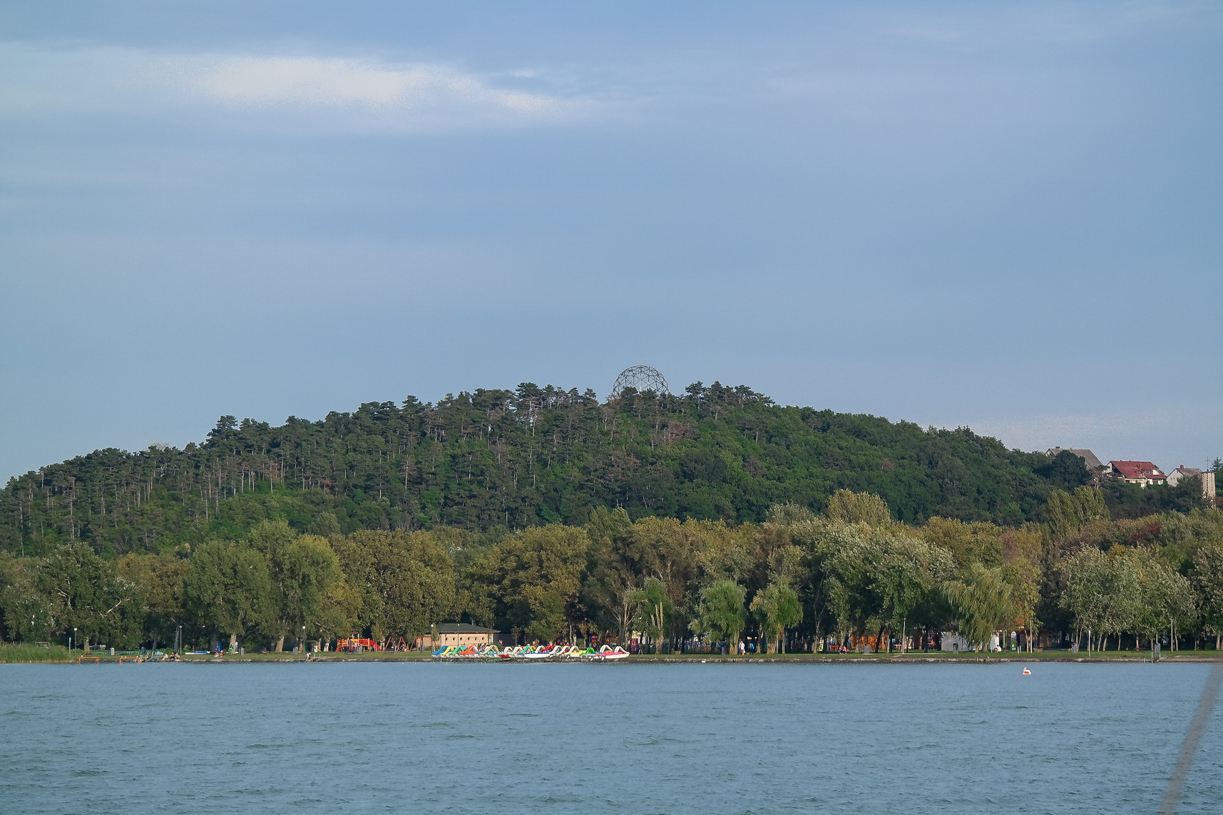 Blick vom Plattensee zur Aussichtsplattform bei Balatonboglár, Ungarn.